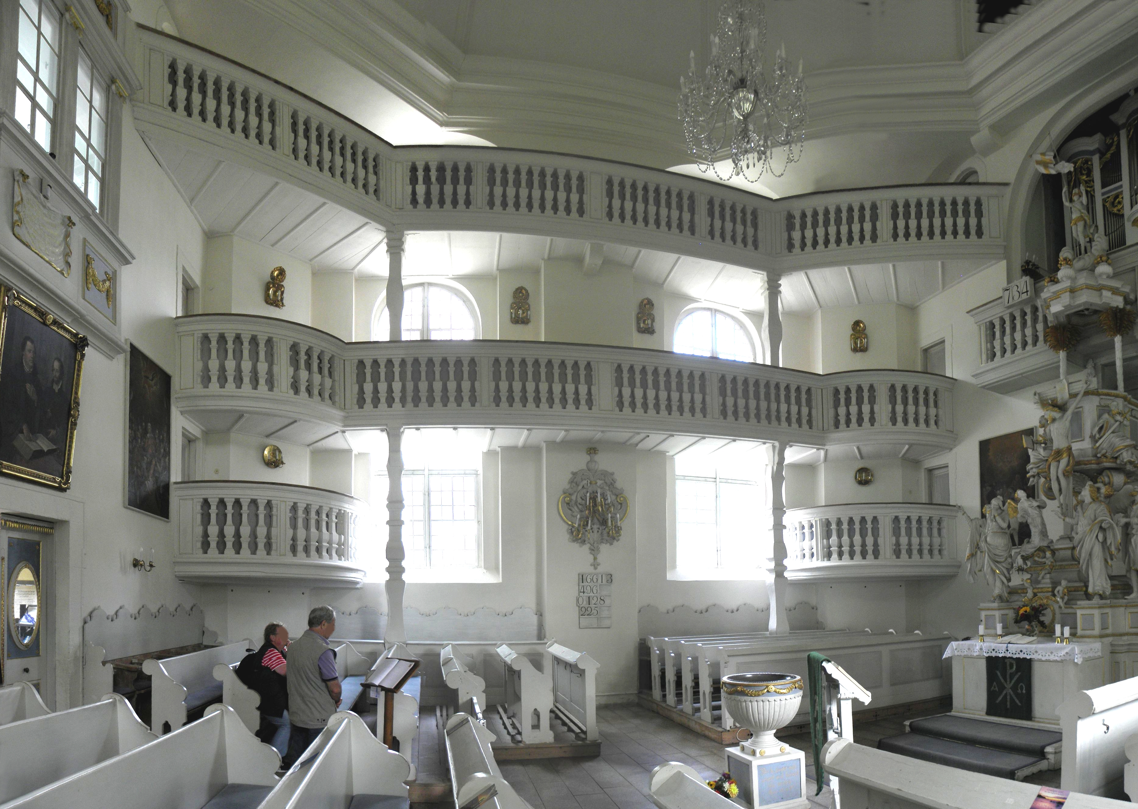 Carlsfeld, Trinitatiskirche, Innenansicht